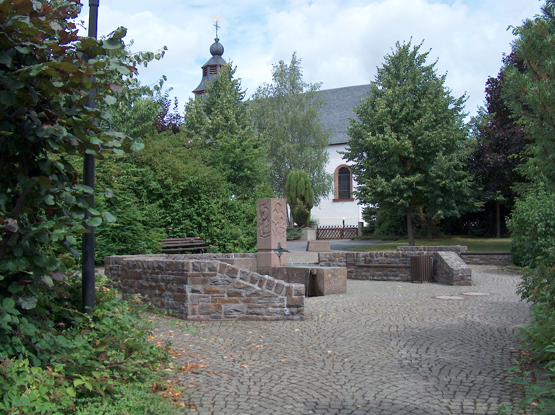 Dorfplatz von Niederoefflingen